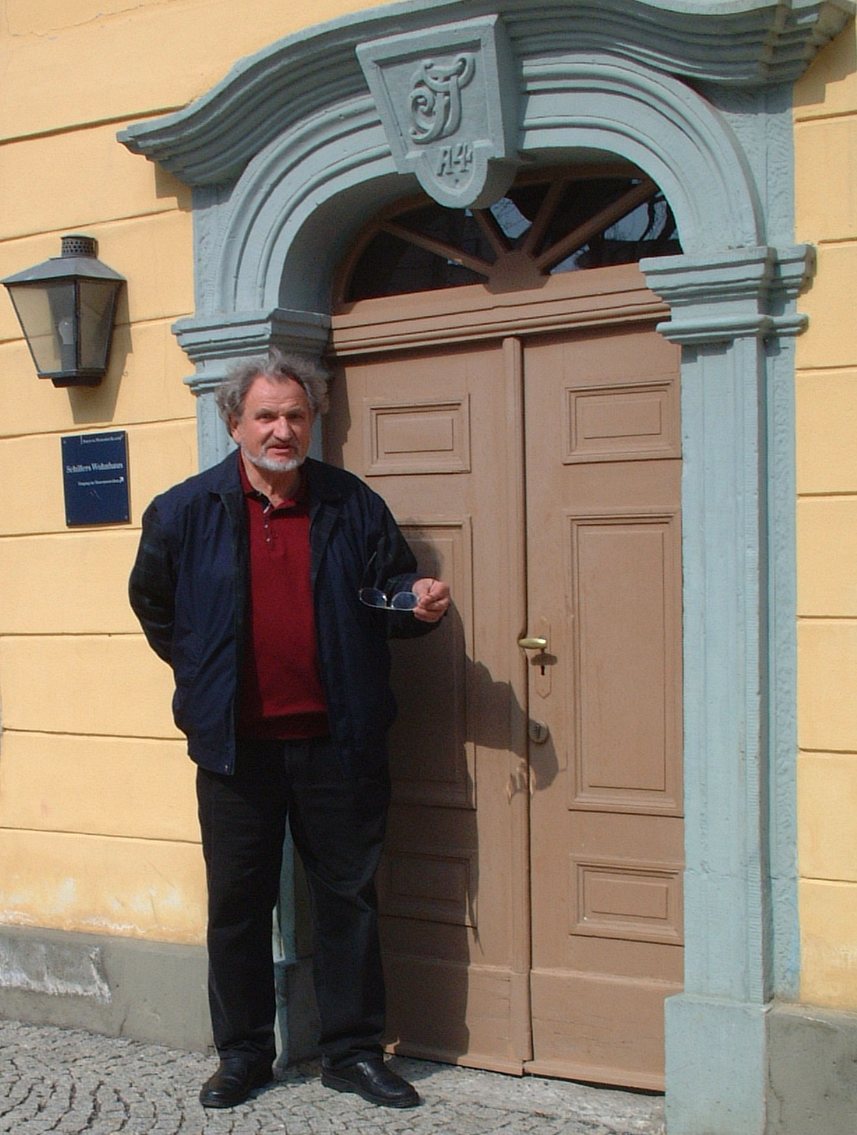 Rainer Hauer vor dem Schillerhaus in Weimar